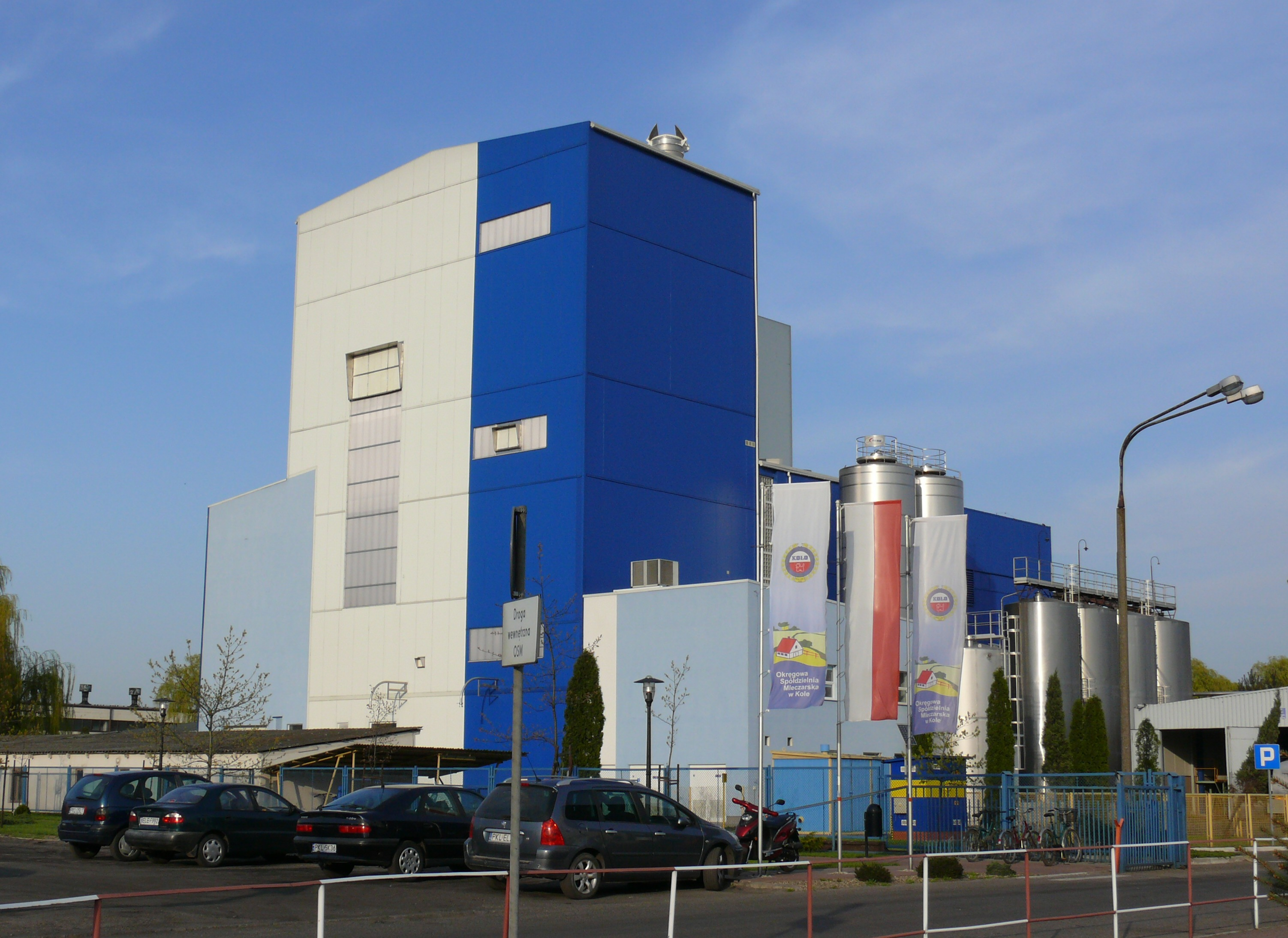 Okręgowa Spółdzielnia Mleczarska w Kole